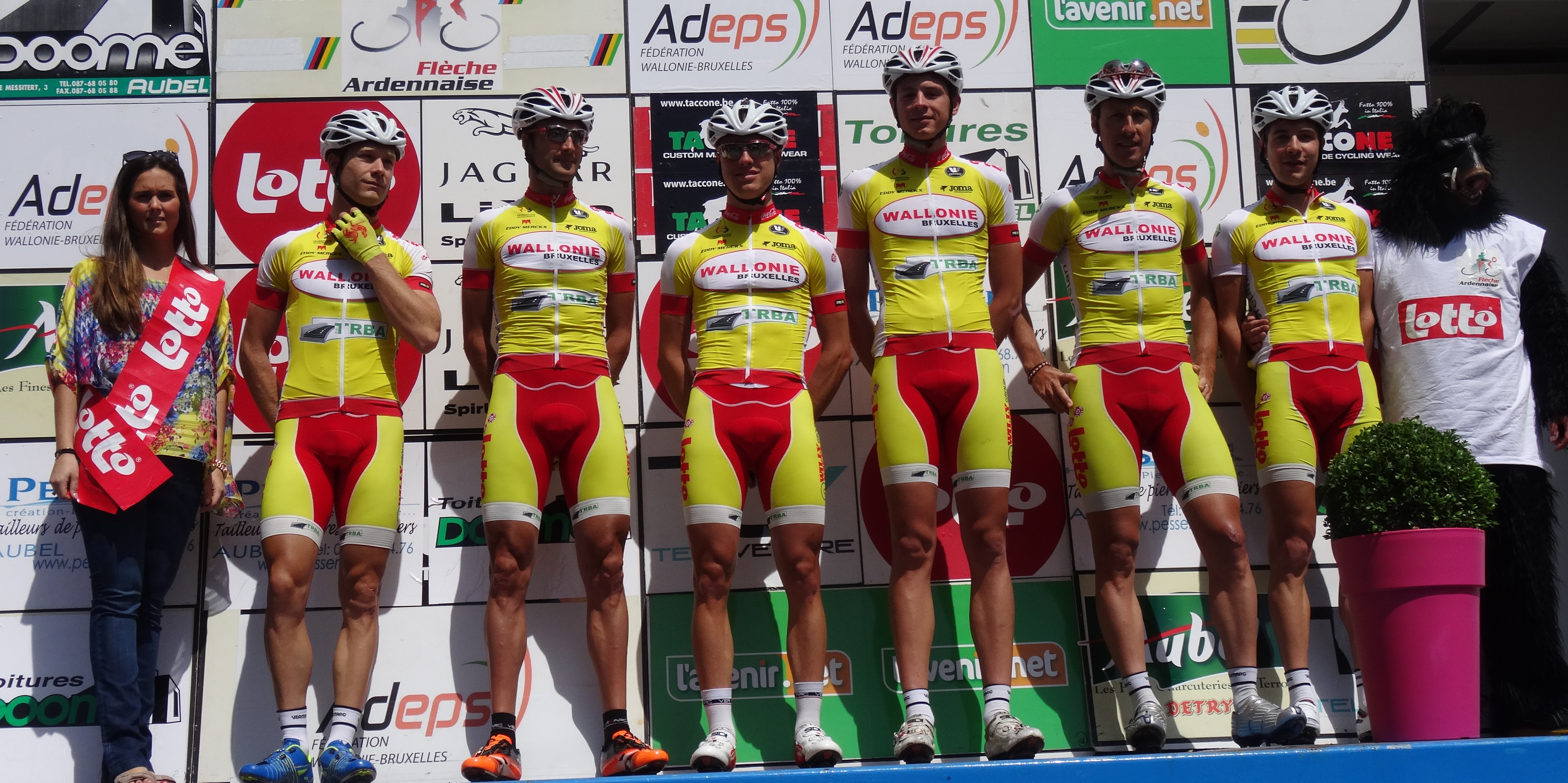 Reportage photographique réalisé le dimanche 22 juin à l'occasion du départ et de l'arrivée de la Flèche ardennaise 2014 à Herve, Belgique.